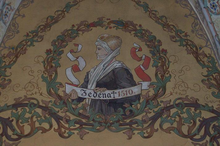 Bild der Zedena von Böhmen auf der Albrechtsburg Meißen